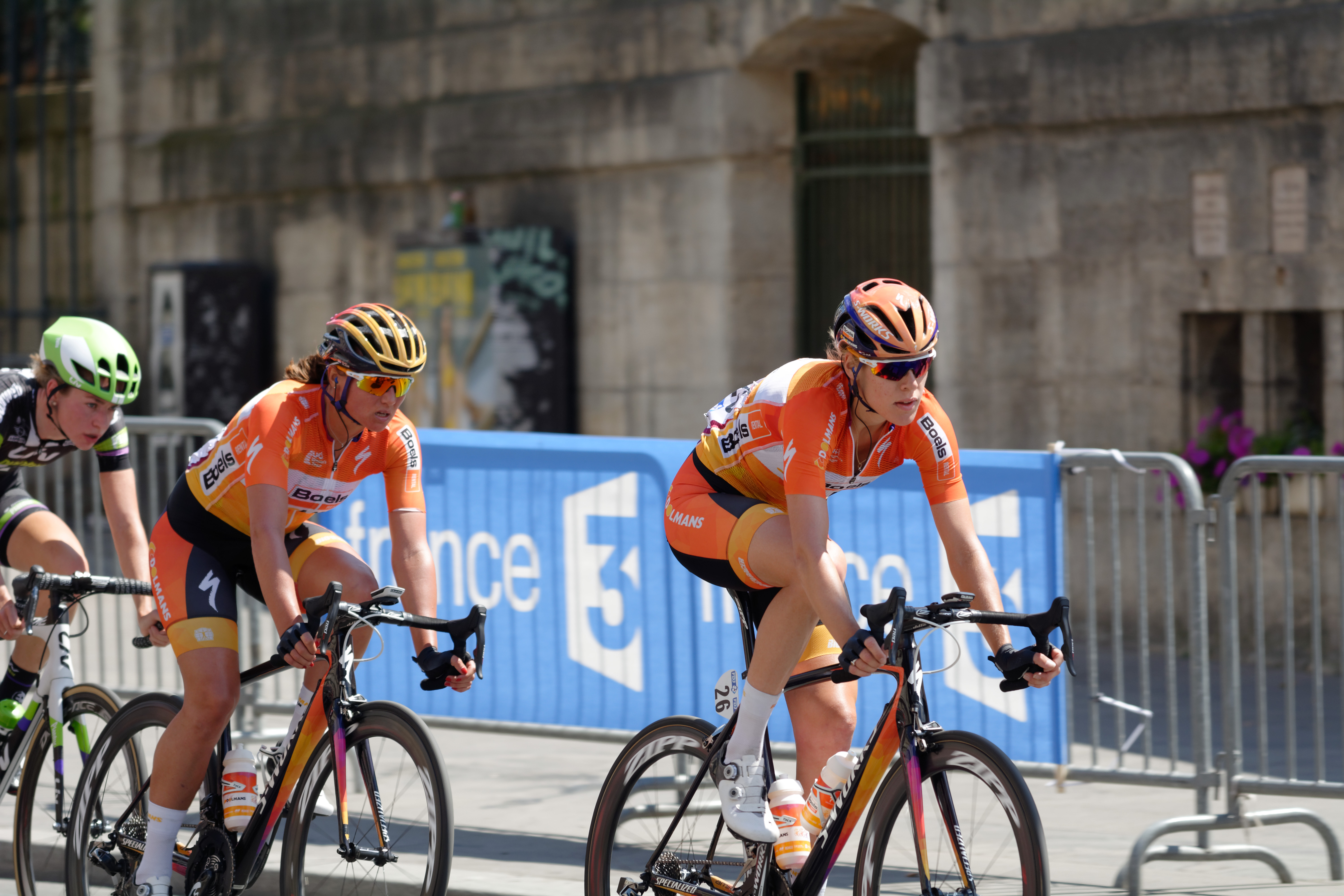 D71_9535_DxO